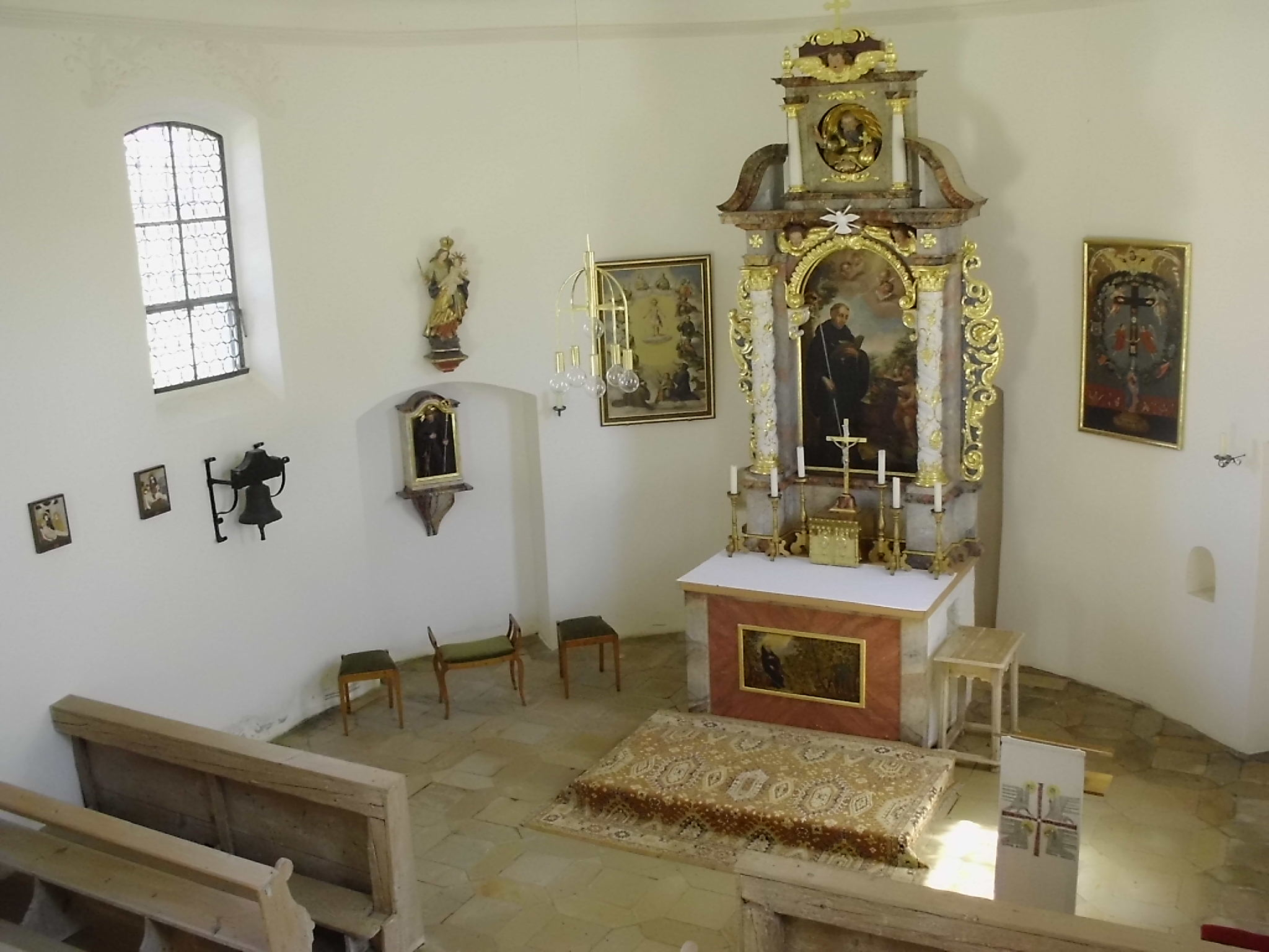 Sankt Egidi, Gemeindeteil von Raitenbuch im Landkreis Weißenburg-Gunzenhausen (Bayern), Inneres der kath. Kapelle St. Ägidius